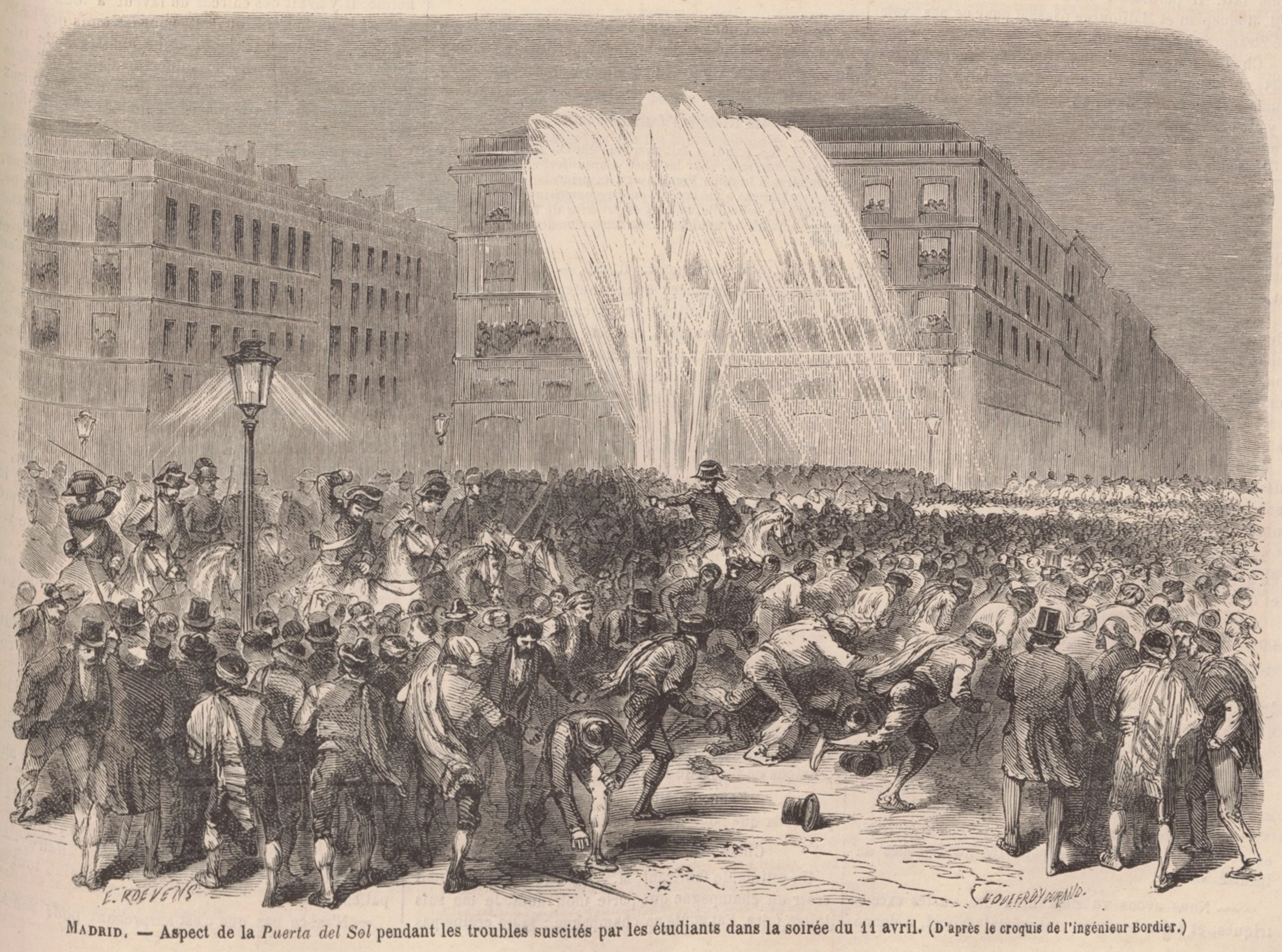 Madrid.– Aspecto de la Puerta del Sol durante los disturbios suscitados por los estudiantes en la tarde del 11 de abril. (Del boceto del ingeniero de Bordier.)